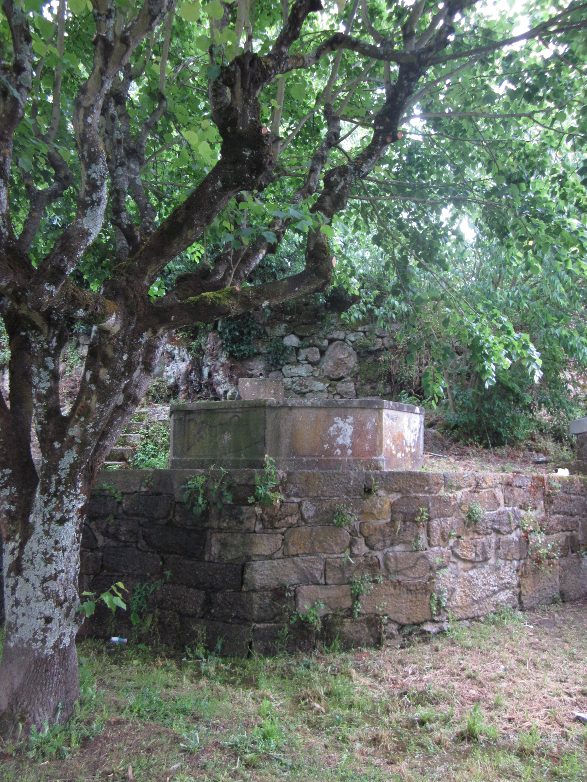 Vista frontal do tanque oitavado que ainda permanece da quinta da Regueira